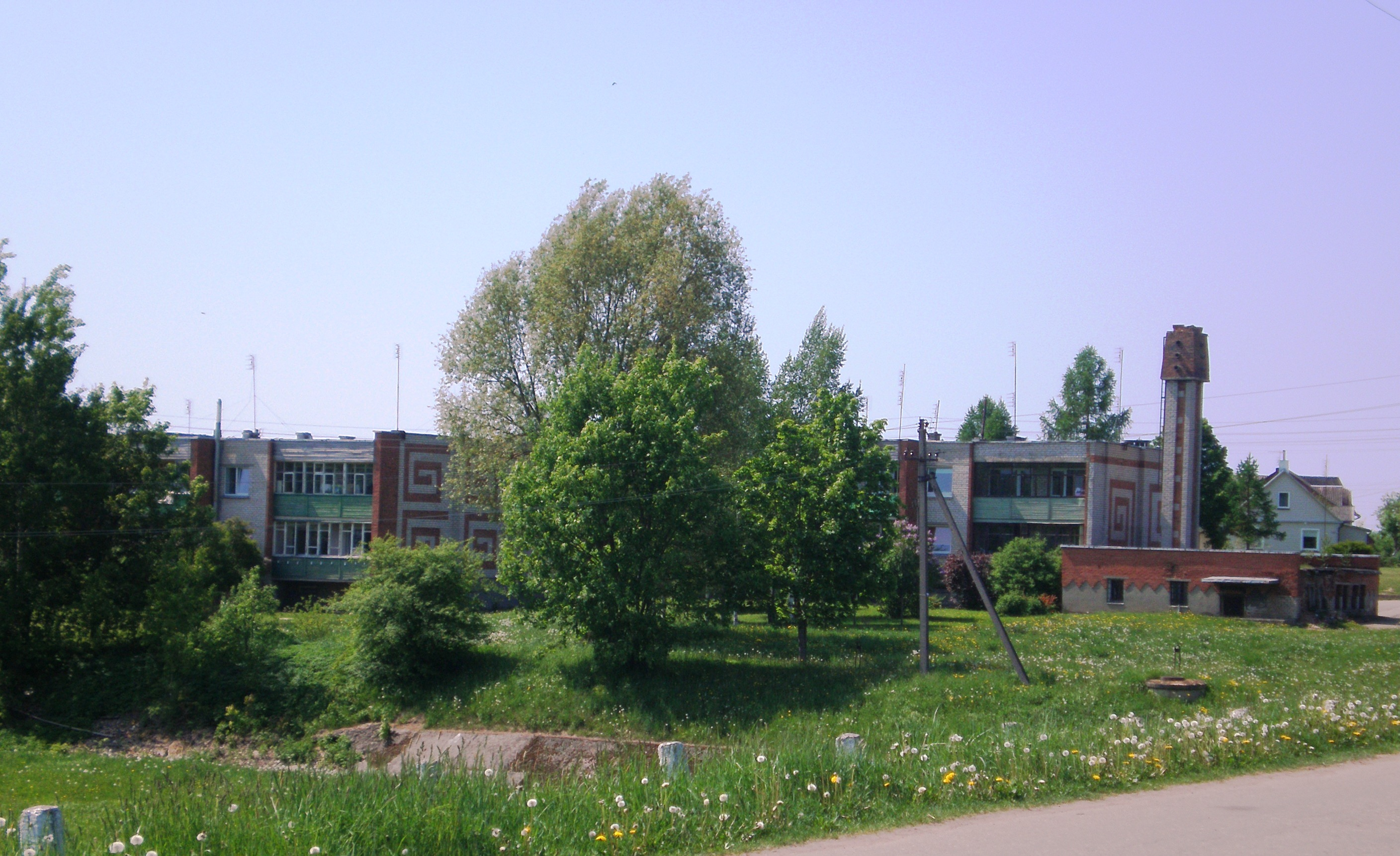 Vainotiškiai, Kėdainių raj.